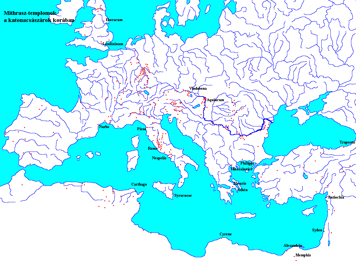 Mithrász-templomok a Római Birodalomban